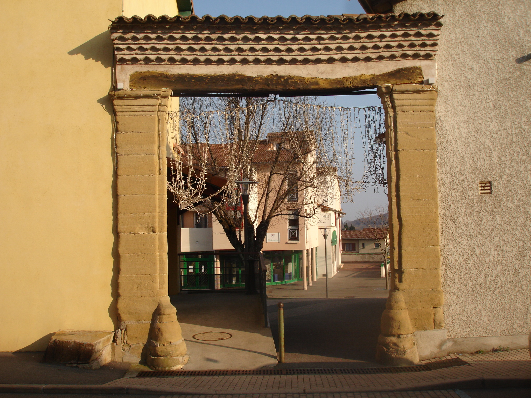 Communay (69) : L'entrée d'accès à la mairie